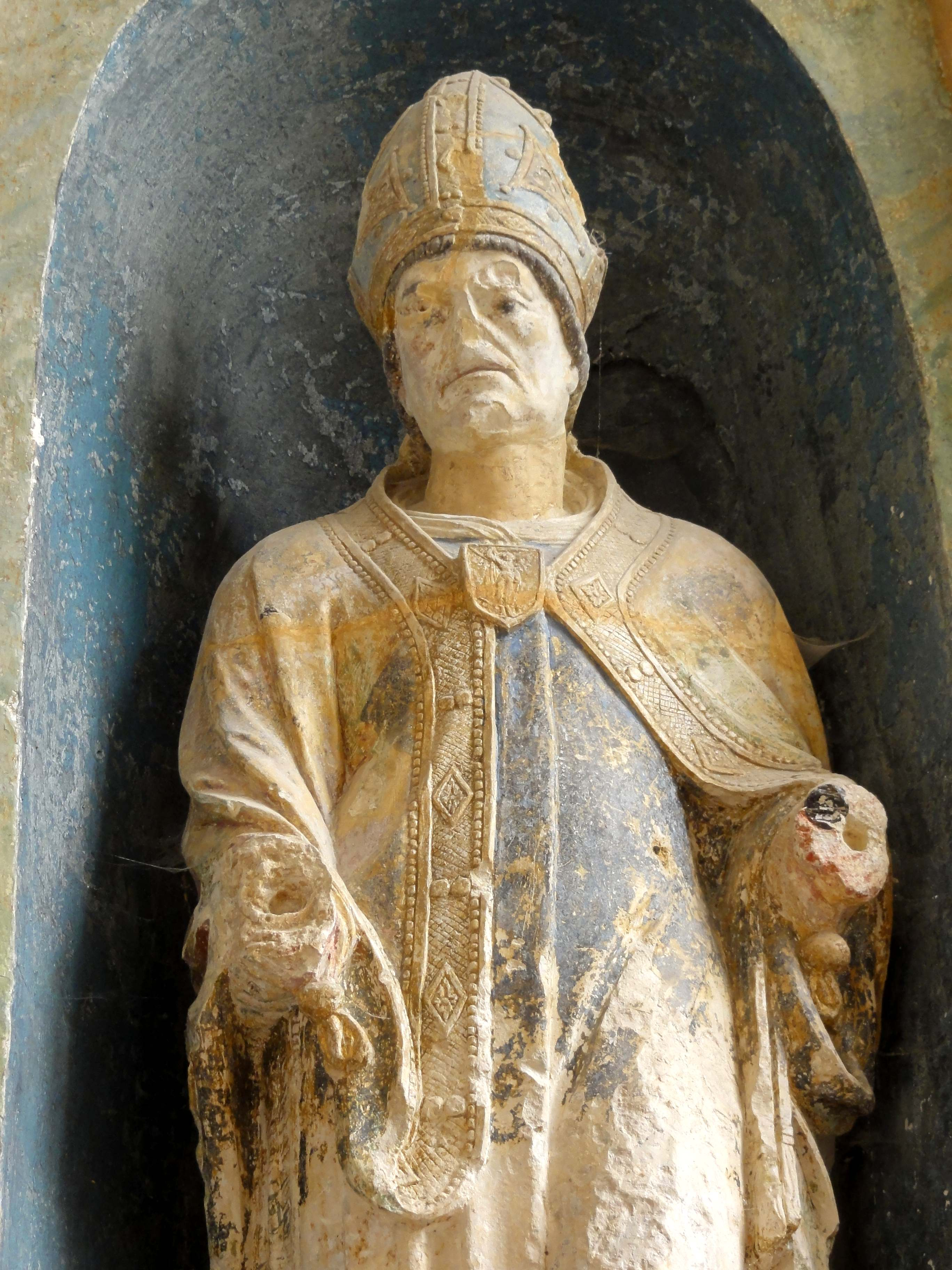 Mobilier de l'église (voir titre).